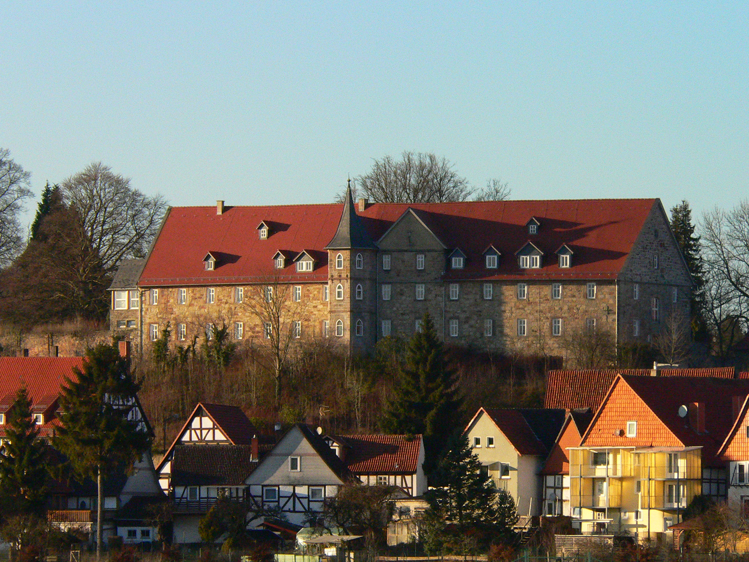 Burg Wolfhagen (Hessen), Südansicht